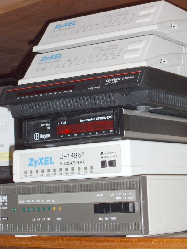 Ein Stapel Modems2x ZyXEL Elite 2864 (ISDN, V90server,V90client) USR Courier V32.bis (altes Gehäuse, 21600 bps) Hayes Smartmodem Optima 9600 (9600bps) ZyXEL U-1496E (16800bps) IBM 5858-01 (synchrones Mainframe-Modem, vermutlich 2400bps)